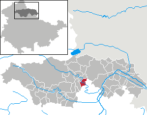 Günserode in Thuringia - Kyffhäuserkreis